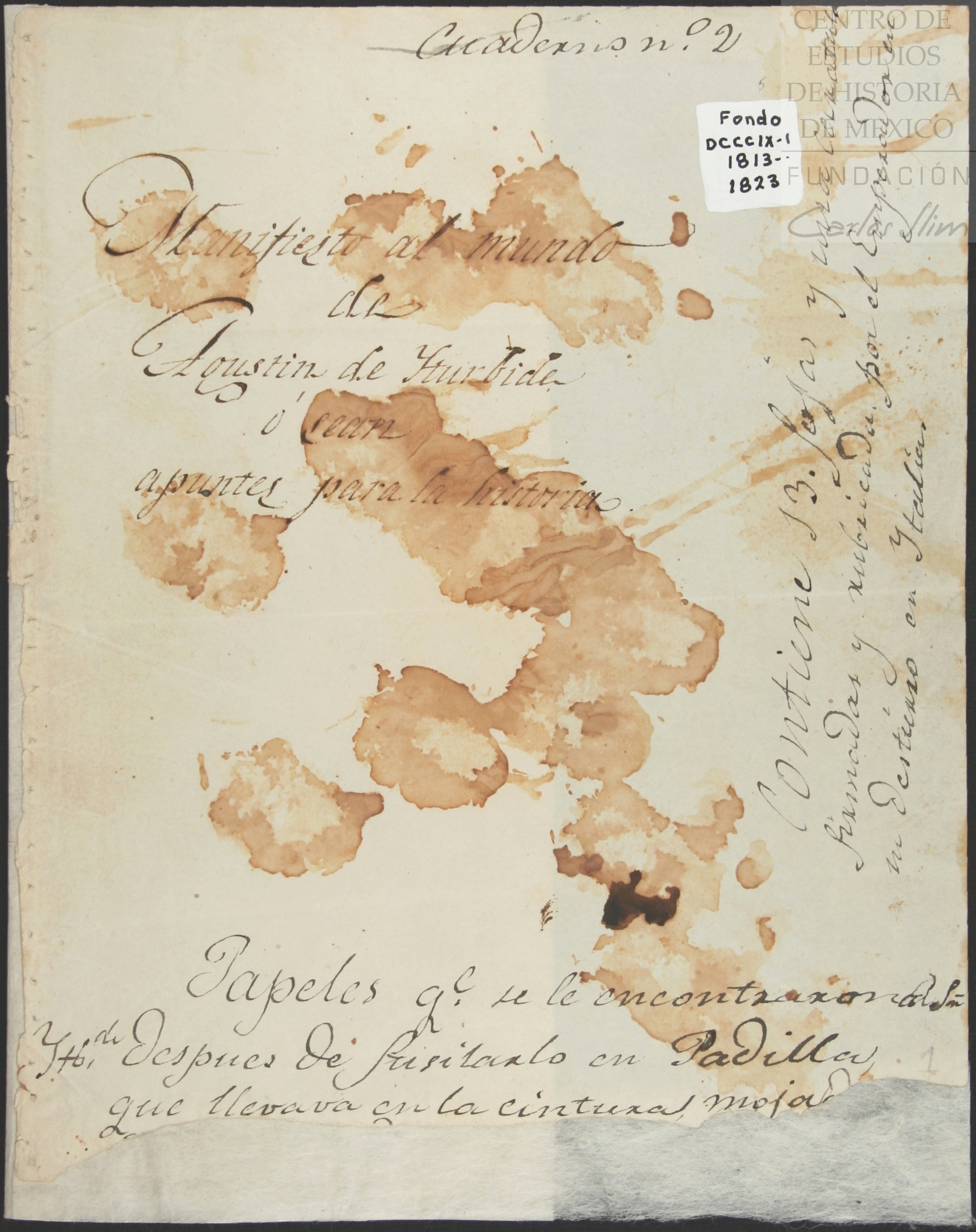 "Manifiesto al mundo de Agustín de Iturbide, o sea apuntes para la Historia". "Papeles que se le encontraron a Agustín de Iturbide después de fusilarlo en Padilla, que llevaba en cintura mojada". El documento presenta resabios de sangre. "Contiene 13 fojas y una carátula firmadas y rubricadas por el Emperador en el destierro en Italia".